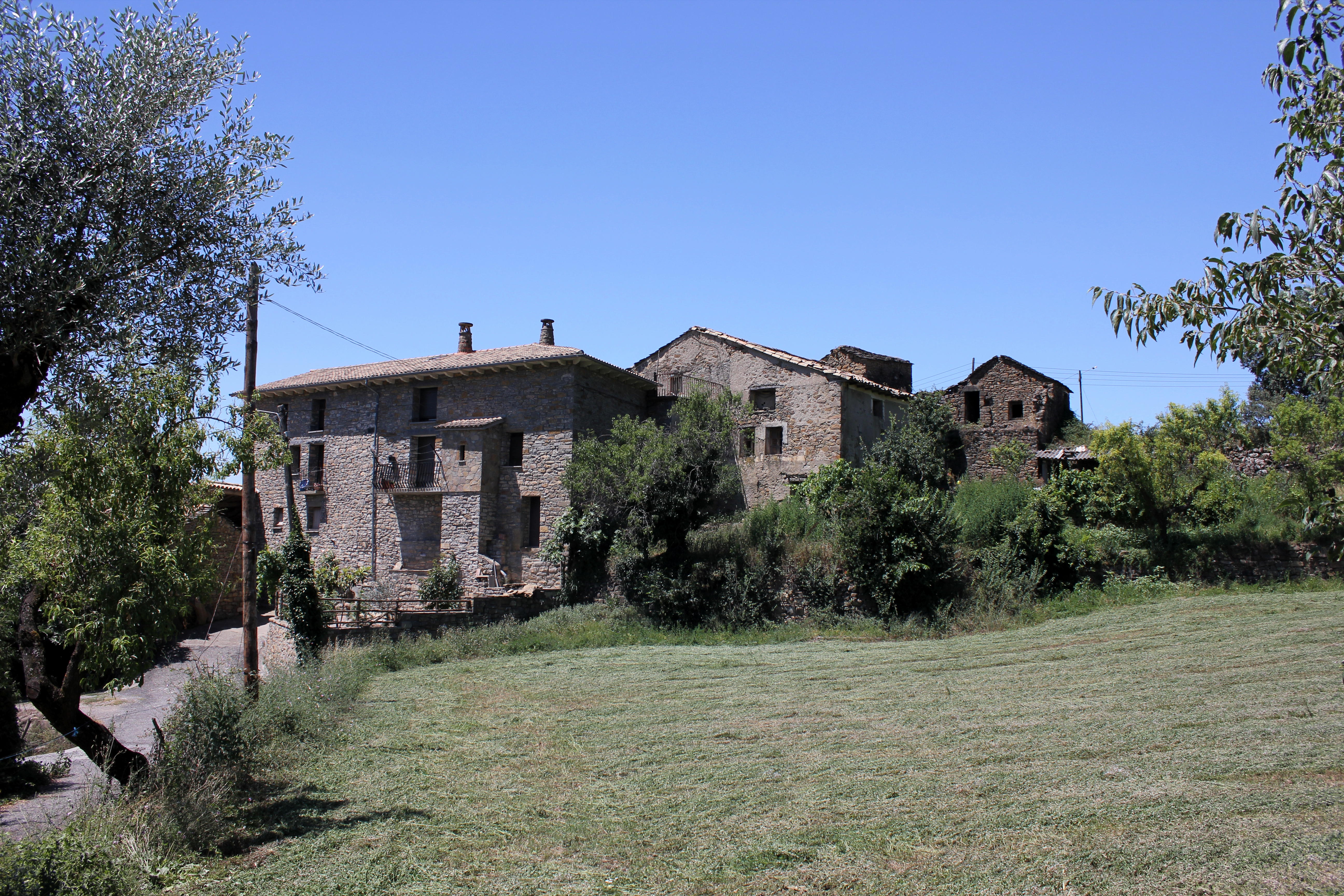 Aragonés: Casas esparzas que tansament forman bella agrupación forman a estructura de Moriello de Monclús (A Fueva).